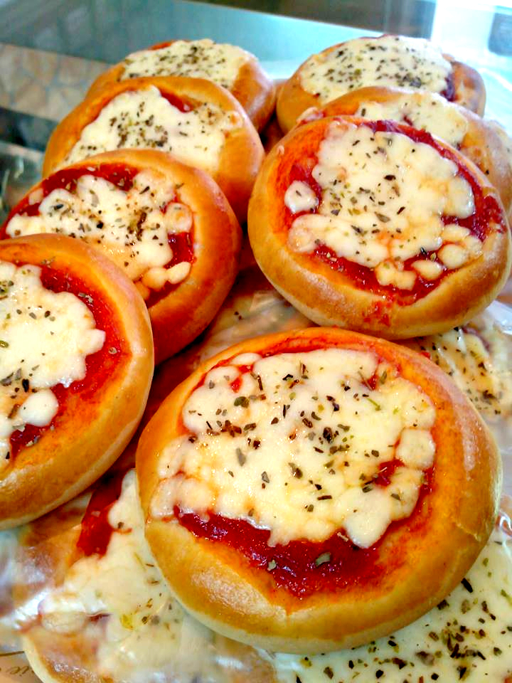 Le pizzette di Siracusa - Pizzeria Mundo Maya